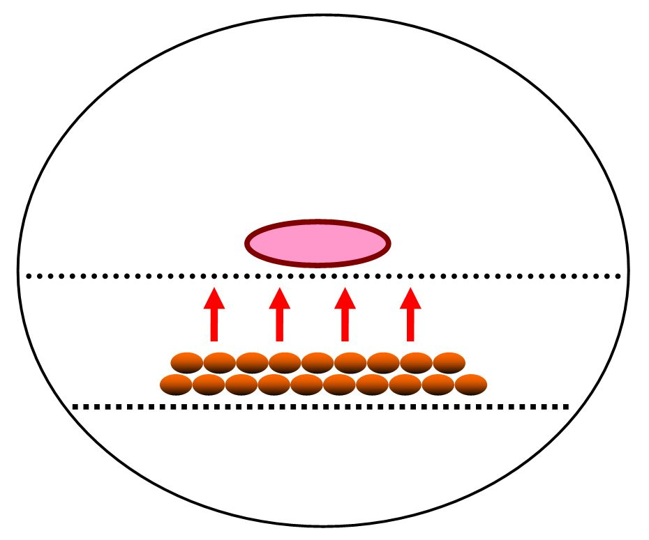 direct grilling over heatsource schematische Darstellung des direkten Grillens über der Hitzequelle Autor: Thogru